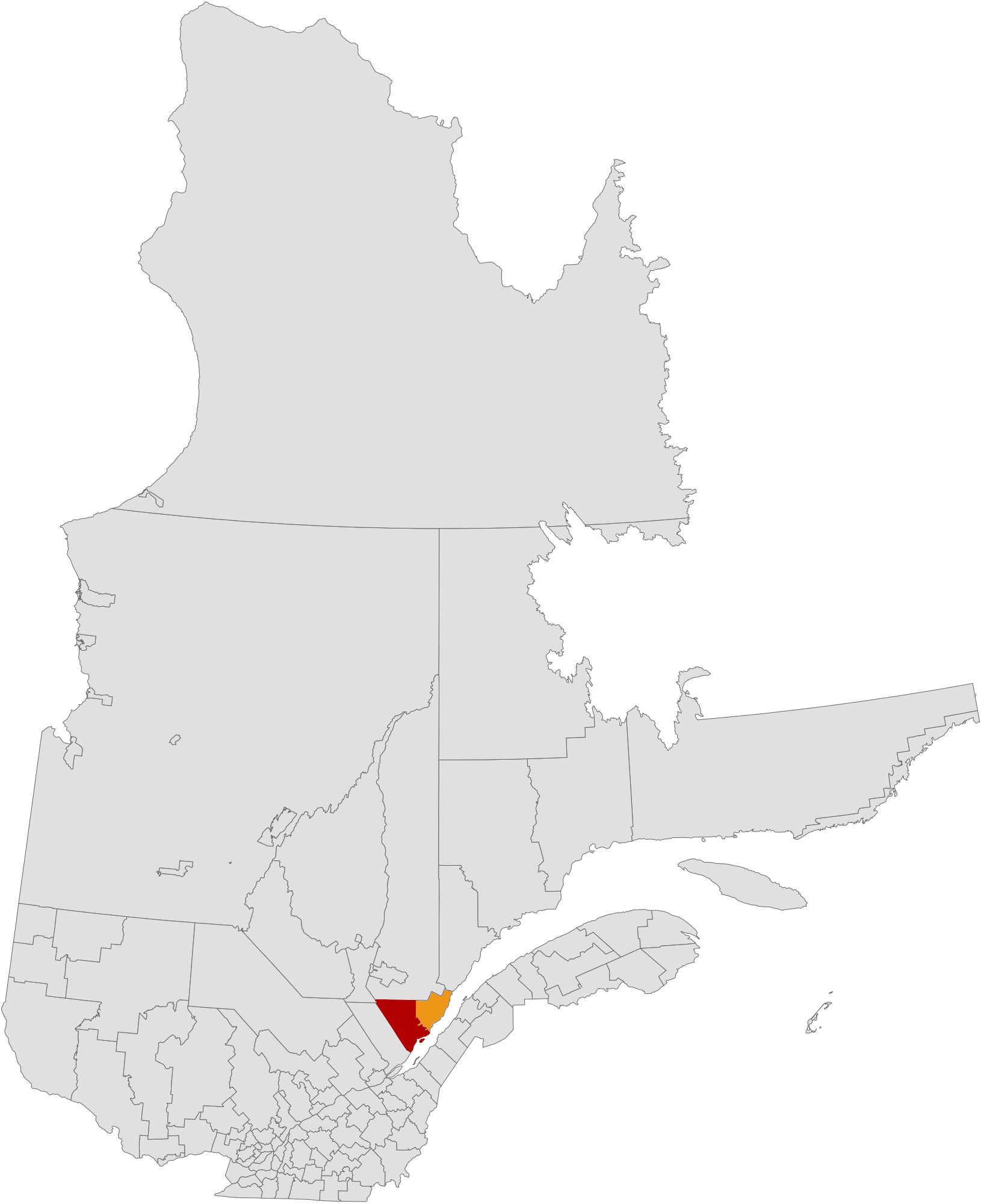 Cette carte montre les deux MRC (Charlevoix et Charlevoix-Est) qui forment, ni plus ni moins, la région naturelle de Charlevoix, elle-même située dans la région administrative de la Capitale-Nationale.